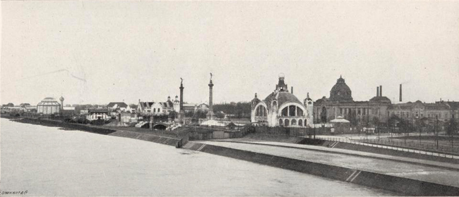 Gesamtansicht der Internationale Kunstausstellung und große Gartenbau-Ausstellung, Düsseldorf 1904